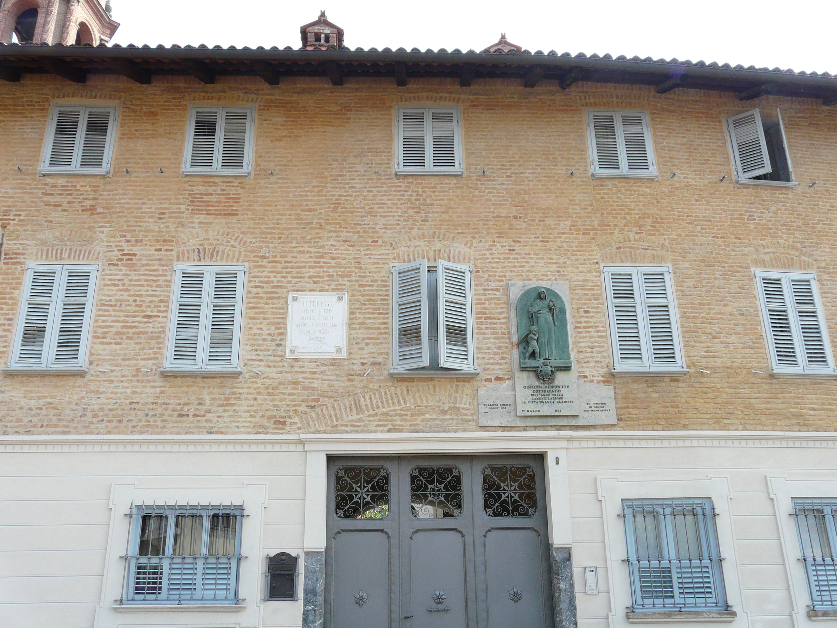 Casa natale di Giuseppe Benedetto Cottolengo, Bra, Piemonte, Italia